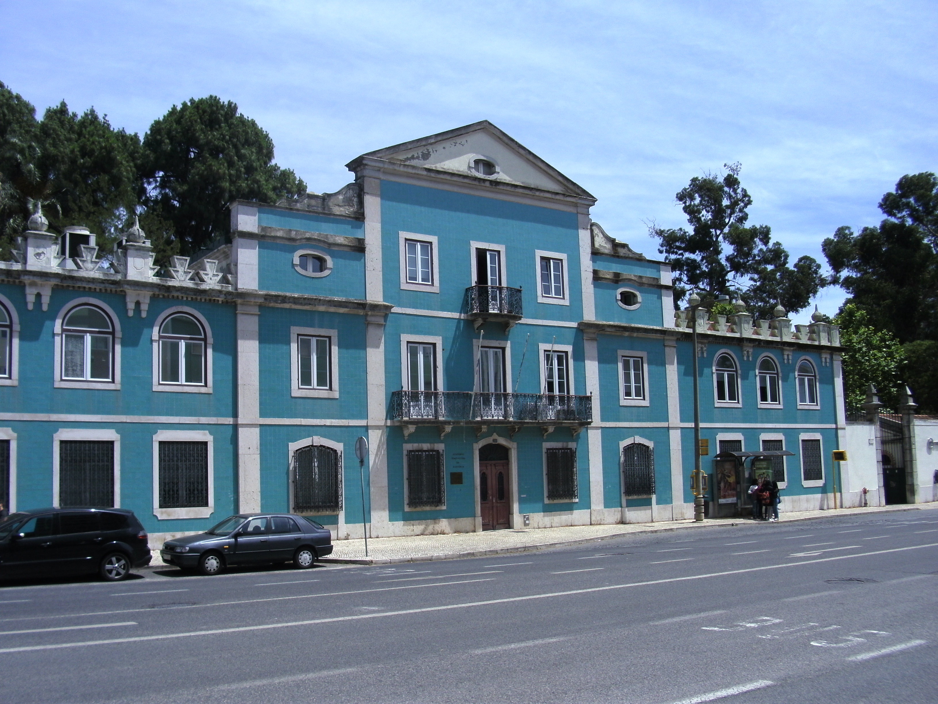 Palácio dos Lilases, Alameda das Linhas de Torres, Lumiar